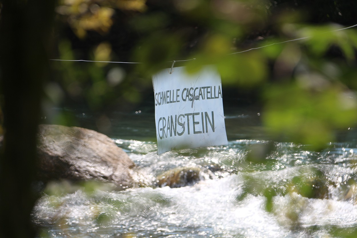 Schildhof Granstein Fischerei